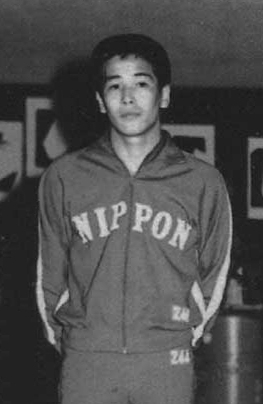 Nobuhiko Hasegawa, 1966 Asian Games